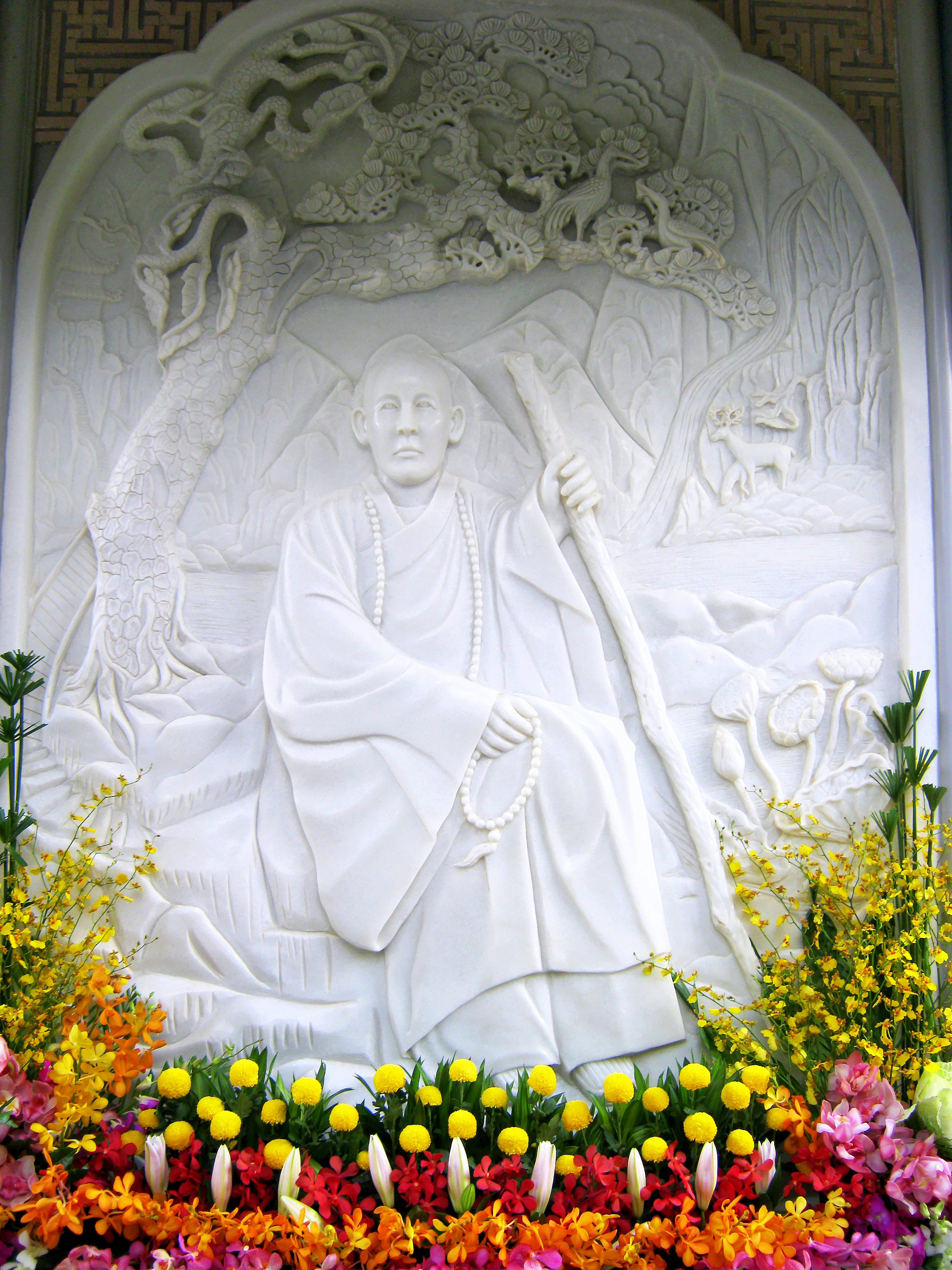 Phù điêu Hòa thượng Thích Thiện Quang (1895 - 1953) trên tháp mộ của ông tại chùa Vạn Linh trên đỉnh núi Cấm (Tịnh Biên, An Giang, Việt Nam).